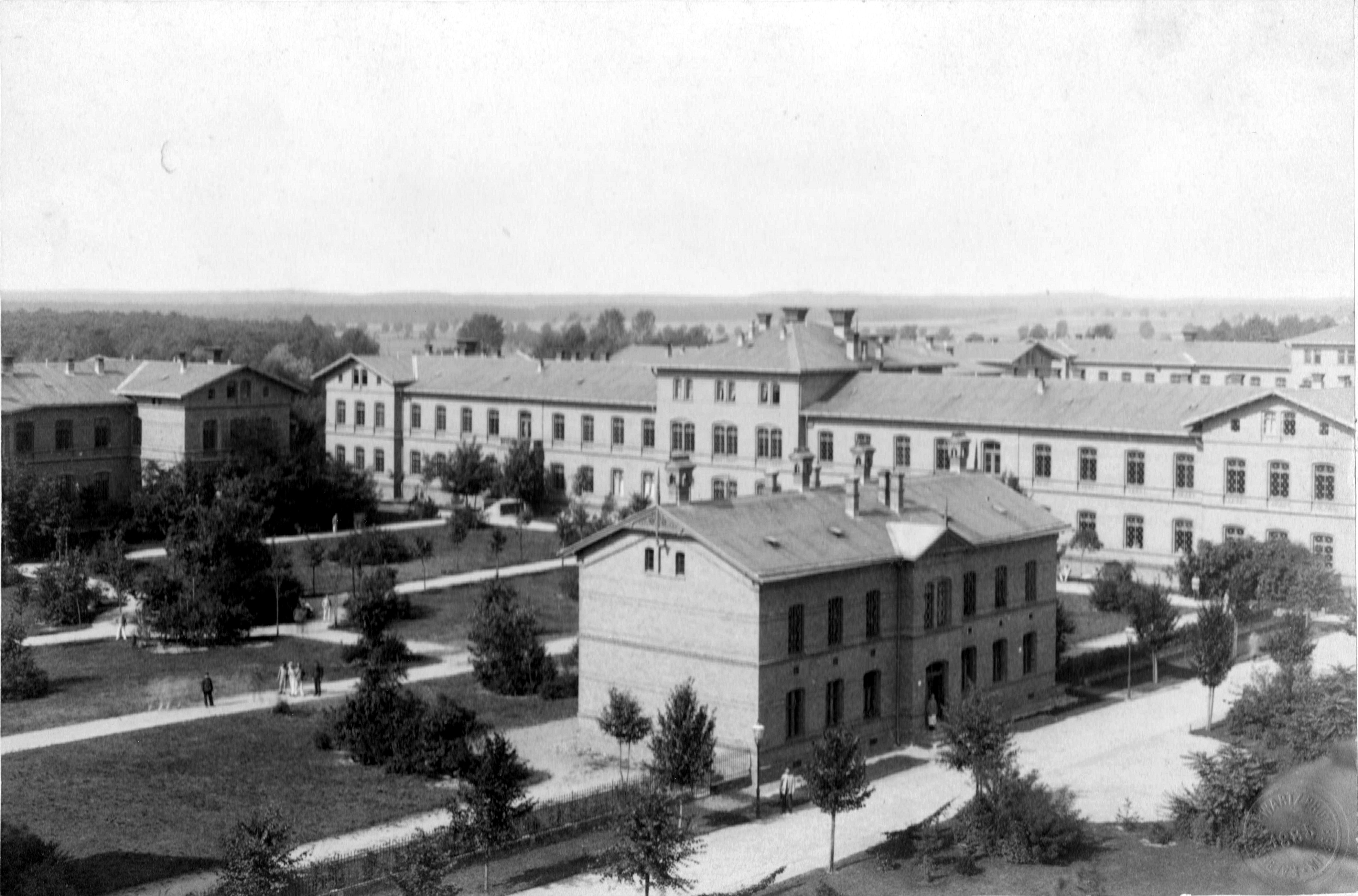 Blick auf die Irrenanstalt der Stadt Berlin zu Dalldorf, Friedrich Albert Schwartz, 1885